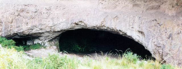 Panorámica de la gruta de Intihuasi durante 1997